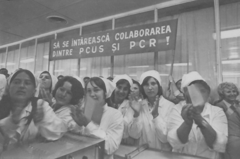 District center Hancesti, Moldova.